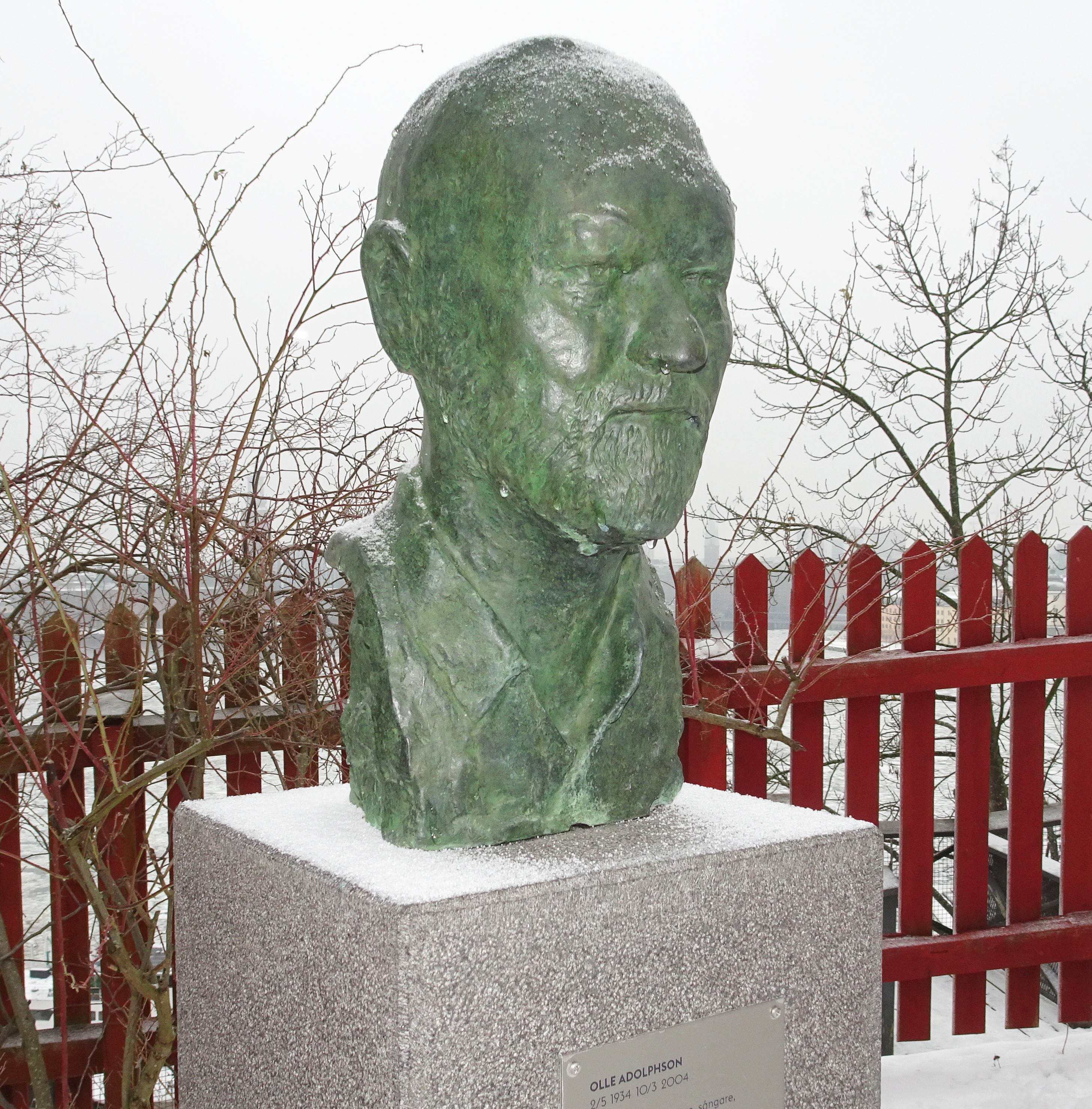 Byst visande Olle Adolphson av Olle Seglert i Olle Adolphsons park